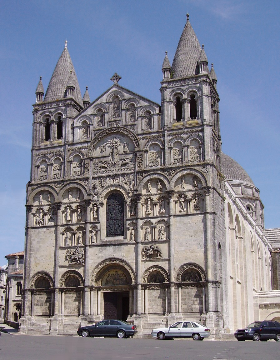 Cathédrale Saint Pierre Angoulême (16000), France